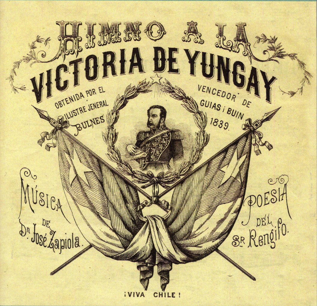 Himno a la victoria de Yungay.